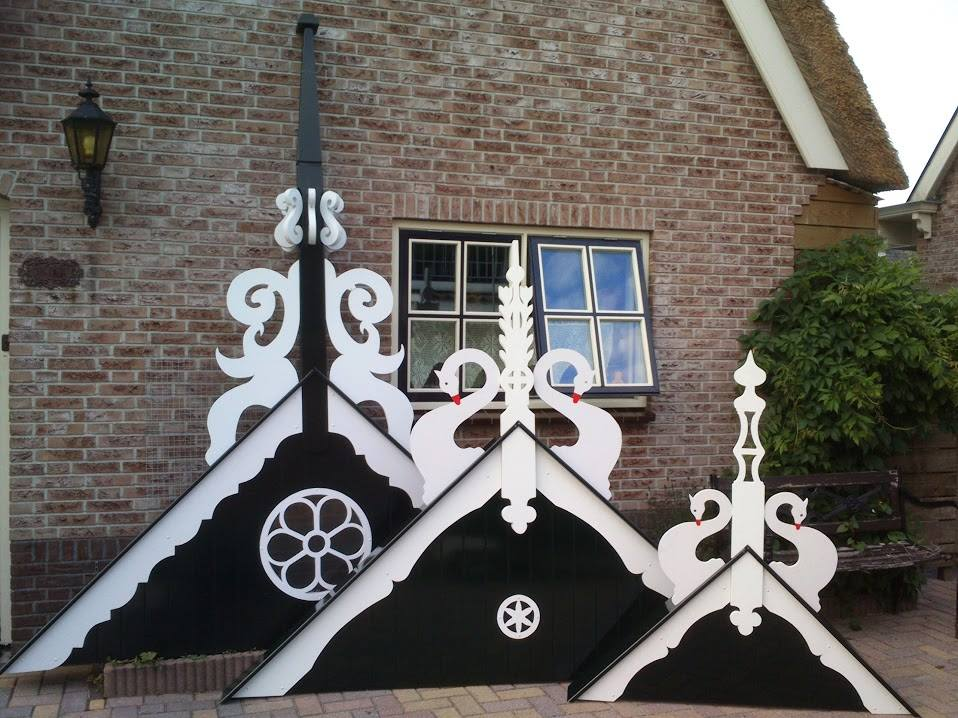 friesland uilebord Batema Damwoude uileborden /uilenborden voor volledig friese kunststof uilenborden voor goedkope uilenborden de laagste prijs. neem gerust contact met ons op via deze site.voor onze goedkope prijzen eventueel incl monteren o